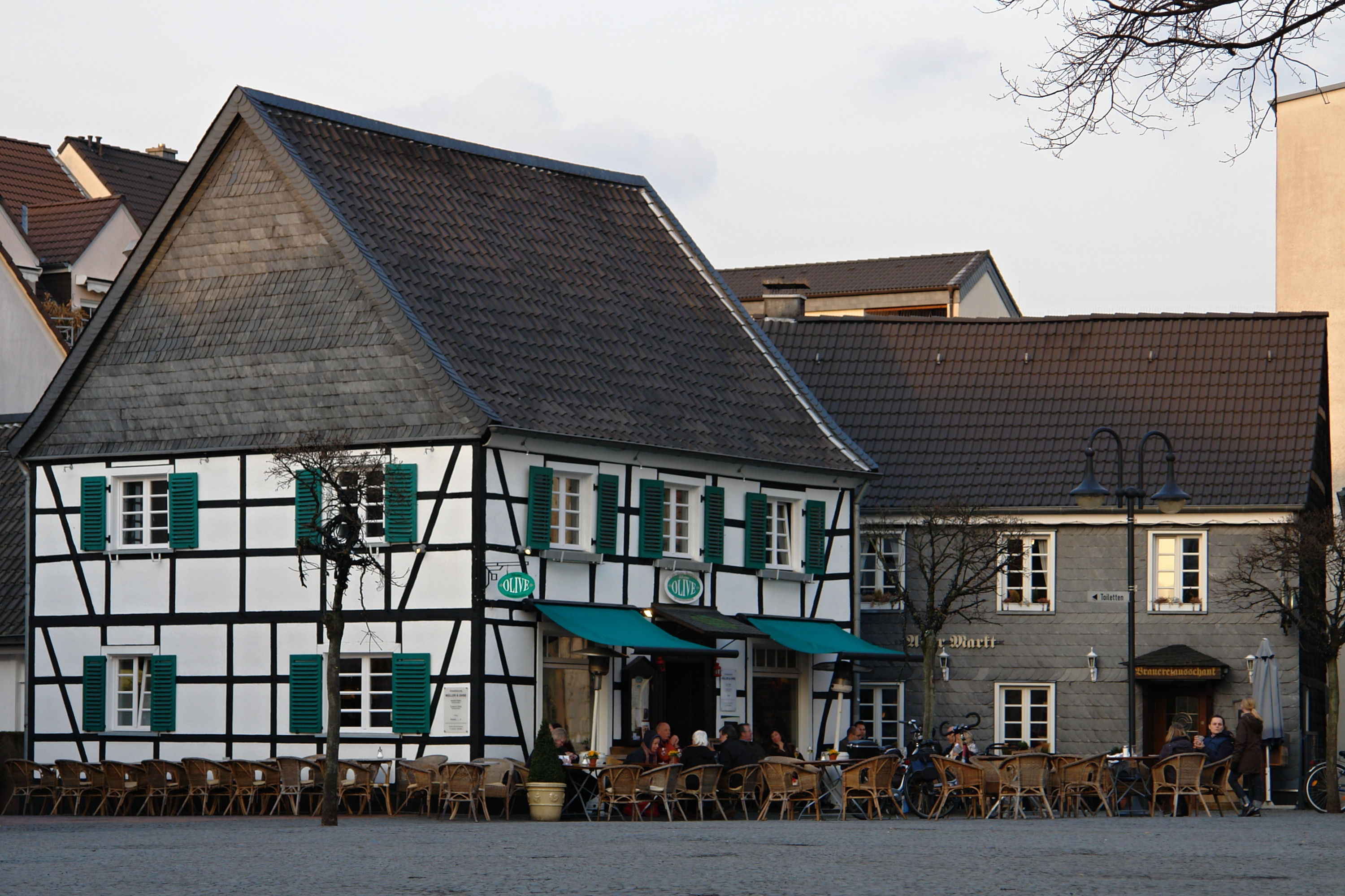 Hilden, Fachwerkhäuser Markt 4-6, Mitte 19. Jh. bis Anfang 20. Jh. Wohnhäuser der Familie Kappel mit Gerberei- u. Schlossereianbauten.